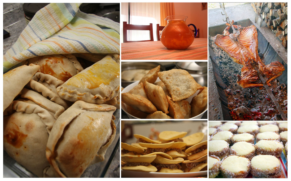 Muestra de la Gastronomía de Chile.